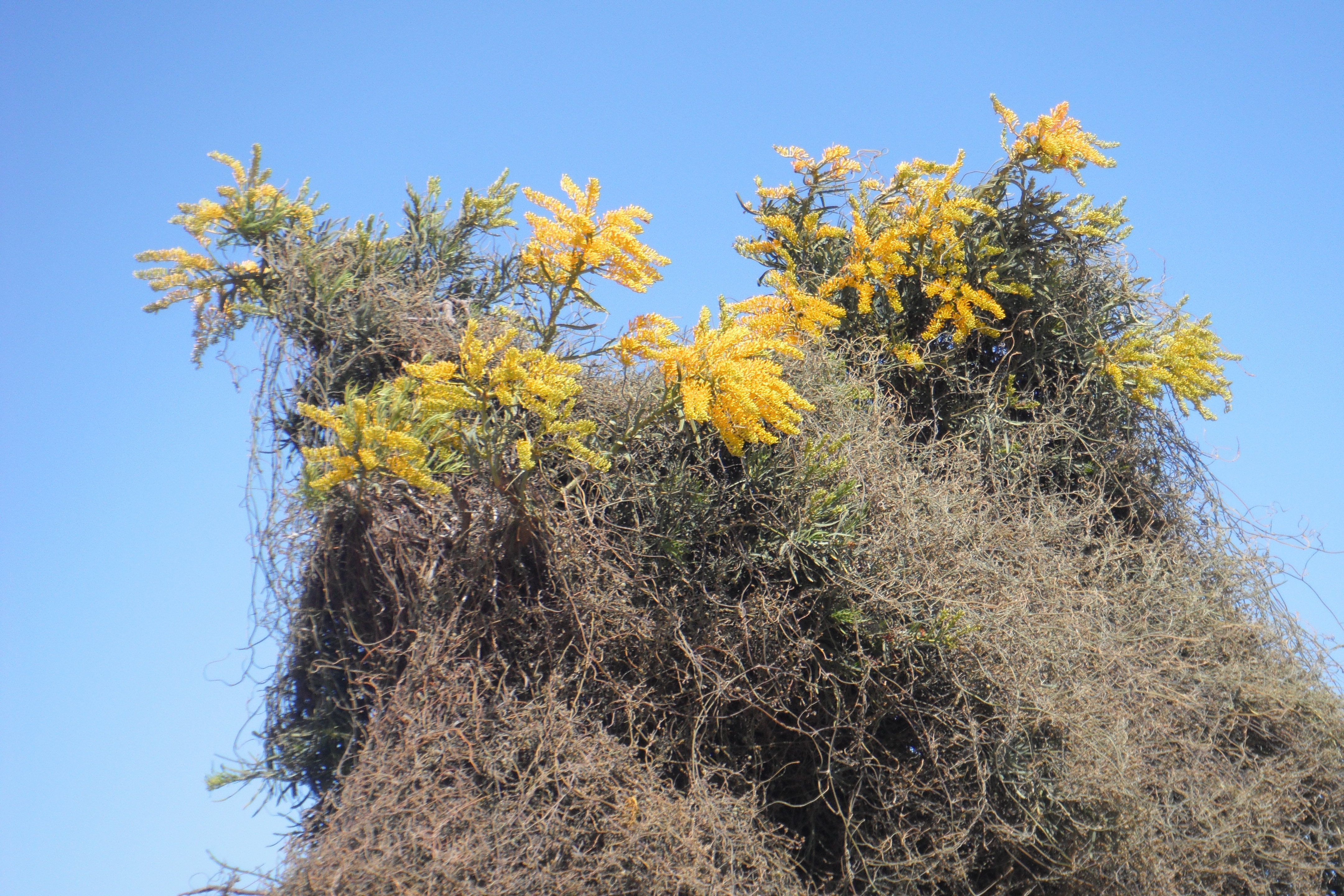 Bush flowers WA